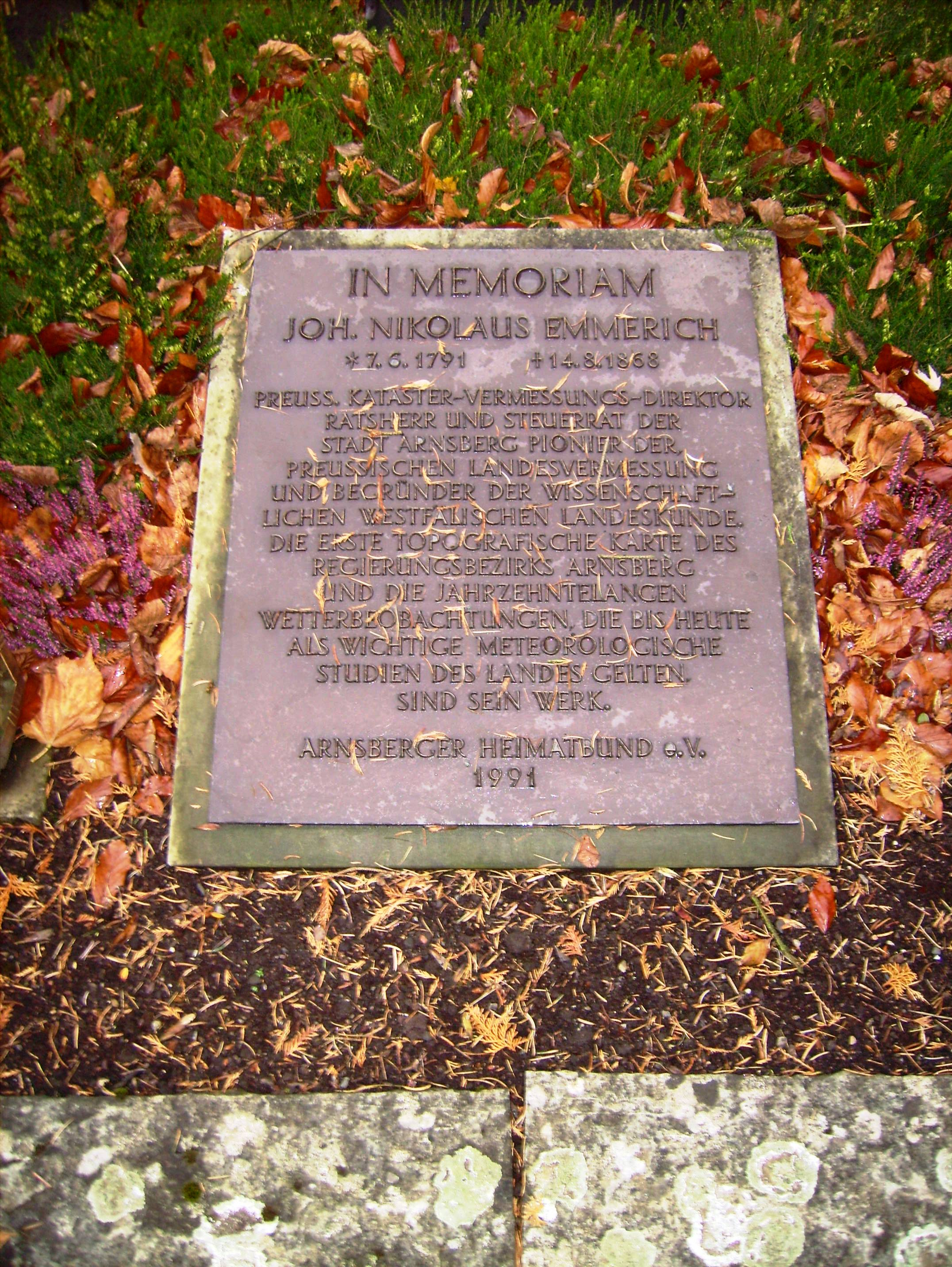 Gedenktafel für Nikolaus Emmerich auf dem Eichholzfriedhof in Arnsberg